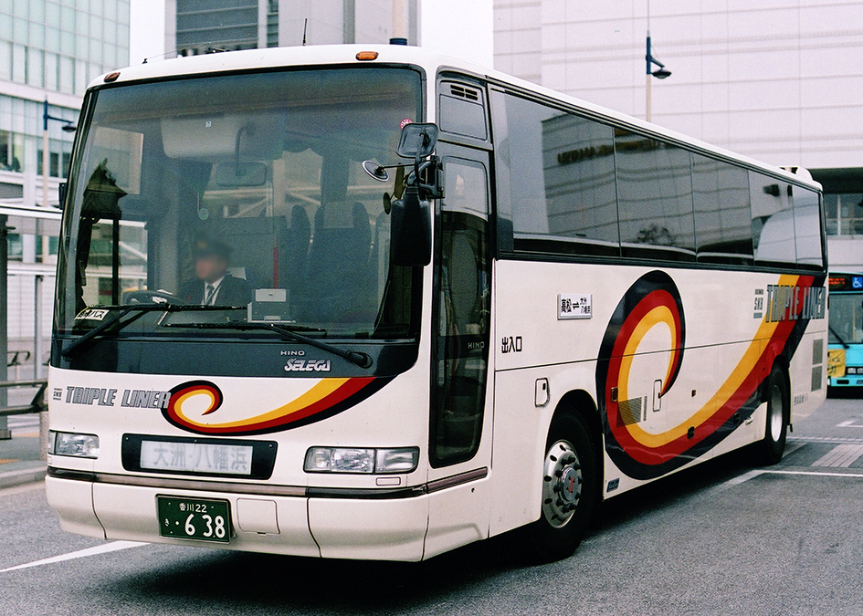 四国高速バス さぬきエクスプレス八幡浜 日野セレガ KC-RU4FSCB